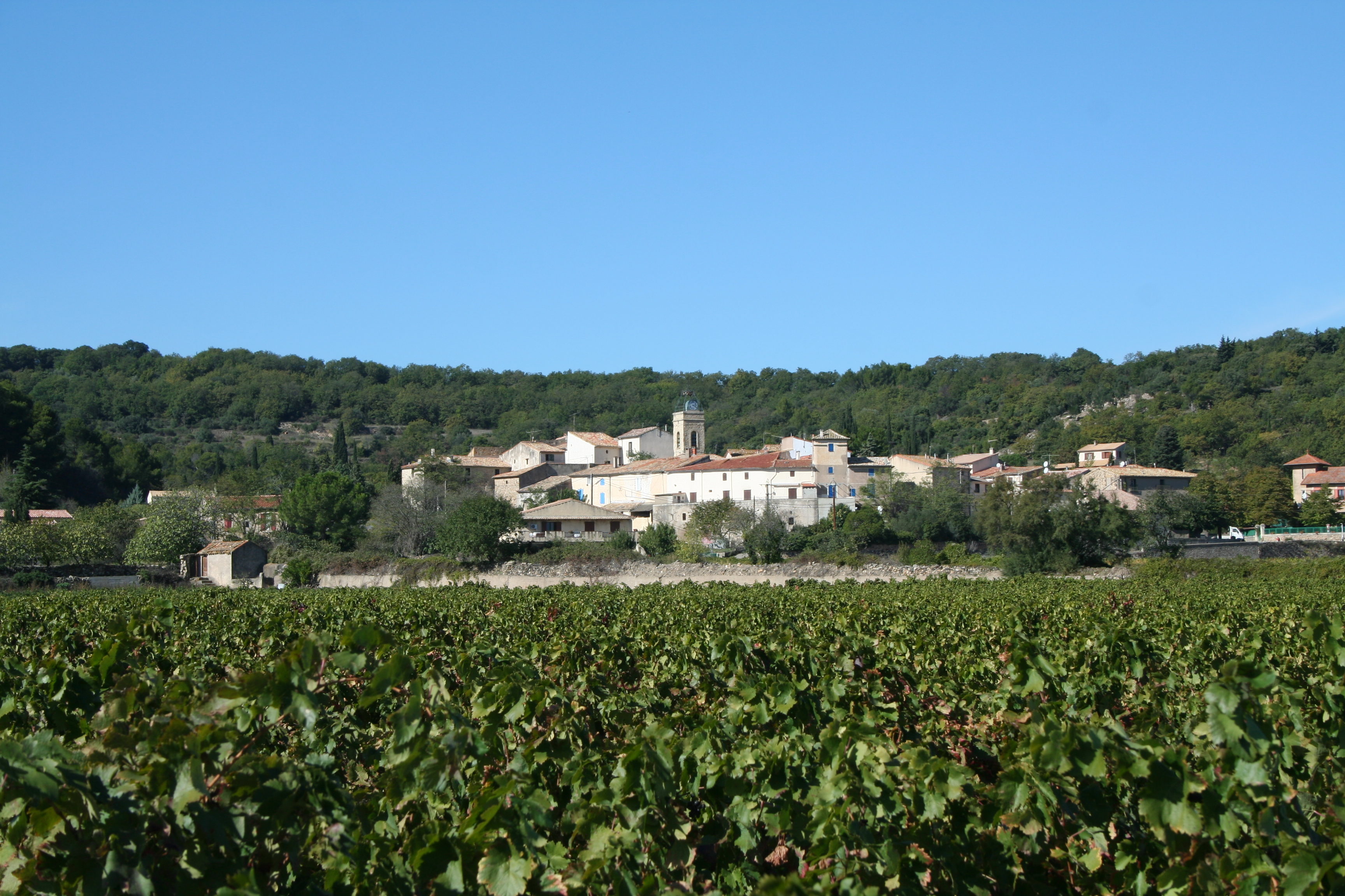 Lieuran-Cabrières (Hérault) - vue générale.